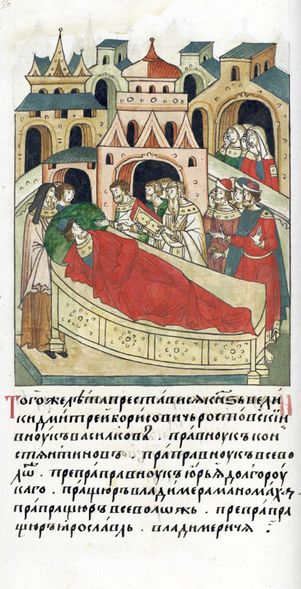 ЛИЦЕВОЙ ЛЕТОПИСНЫЙ СВОД В том же году преставился князь великий Дмитрий Борисович Ростовский, внук Васильков, правнук Константинов, праправнук Всеволодов, препраправнук Юрия Долгорукого, (потомок) пращура Владимира Манамаха, прапращура Всеволода, препрапращура Ярослава Владимировича.